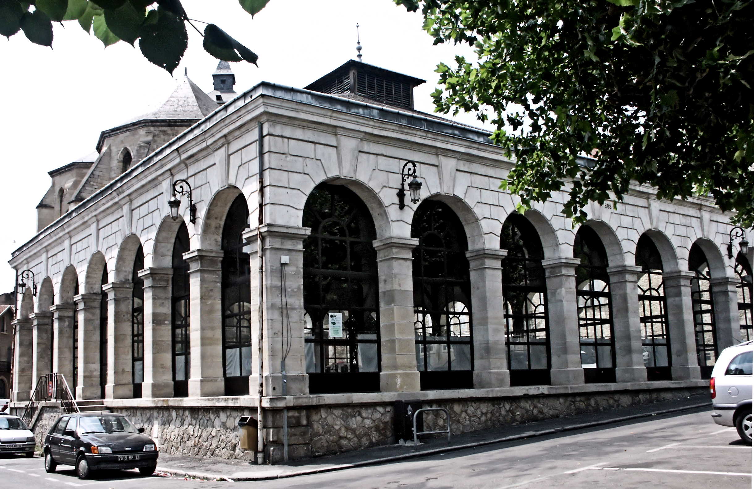 Le marché couvert de Villefranche de Rouergue